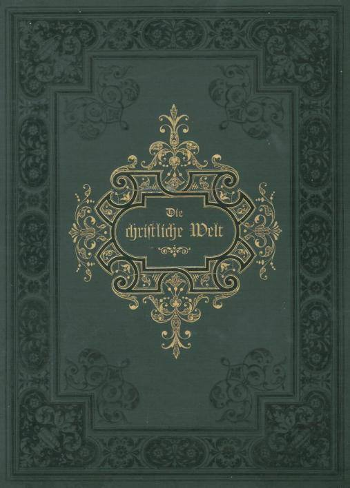 Die Christliche Welt